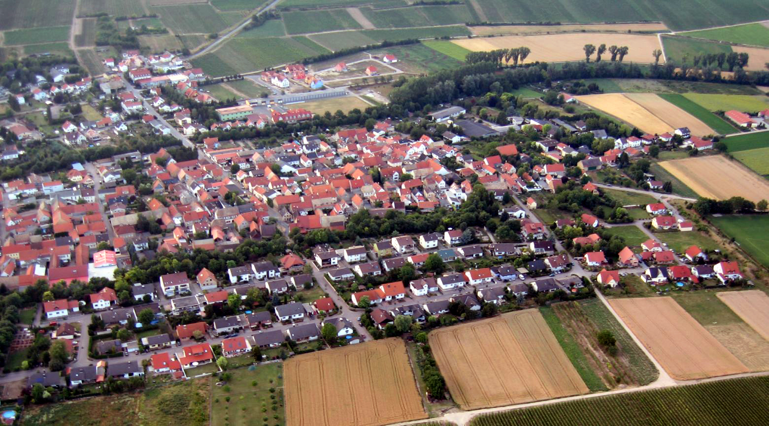 Luftbild von Bechtolsheim vom 9. Juli 2005 aufgenommen vom Gleitschirm aus, fotografiert von mir. Das Bild zeigt Bechtolsheim aus der Sicht oberhalb des Petersbergs kommend. Im Vordergrund kann man einige Felder erkennen sowie in der rechten Bildhälfte ein paar Rebzeilen die zum Petersberg hinaufführen. Das Bild fängt auf der linken Seite mit dem Ende des Friedhofes an. Die ersten vier Häuserzeilen, mit hauptsächlich dunkler Dachbedeckung, sind das alte Neubaugebiet aus den 1970er Jahren. Es erstreckt sich bis zu der Straße die dann ein Feldweg wird und Richtung Weinberg verläuft. Danach die 2,5 Häuserzeilen (hauptsächlich rot gedeckt) ist das Neubaugebiet der 1990er Jahre. In der rechten Bildhälfte kann man den Rasenplatz (Fußballfeld) des Sportplatzes erkennen. Nach den oben genannten hier Häuserzeilen, kann man eine durchgehende Baumreihe erkennen. Hierbei handelt es sich um den alten Dorfgraben. Heute kann dieser als Fuß- und Radweg benutzt werden. Dahinter schließt sich, bis zur nächsten Baumreihe, der Ortskern an, diese Baumreihe verläuft am Ufer der Selz.